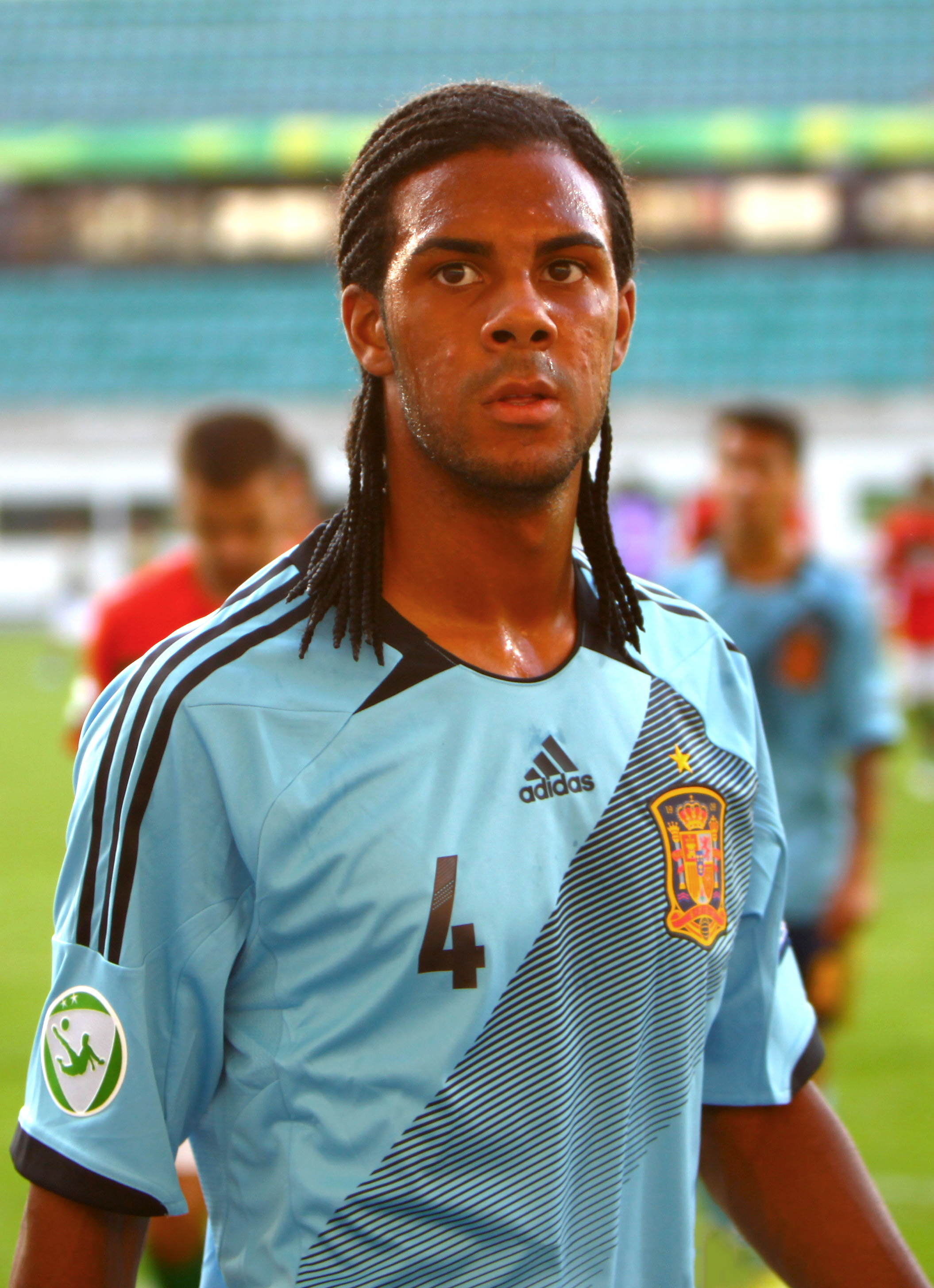 U-19 Portugal vs Spain.